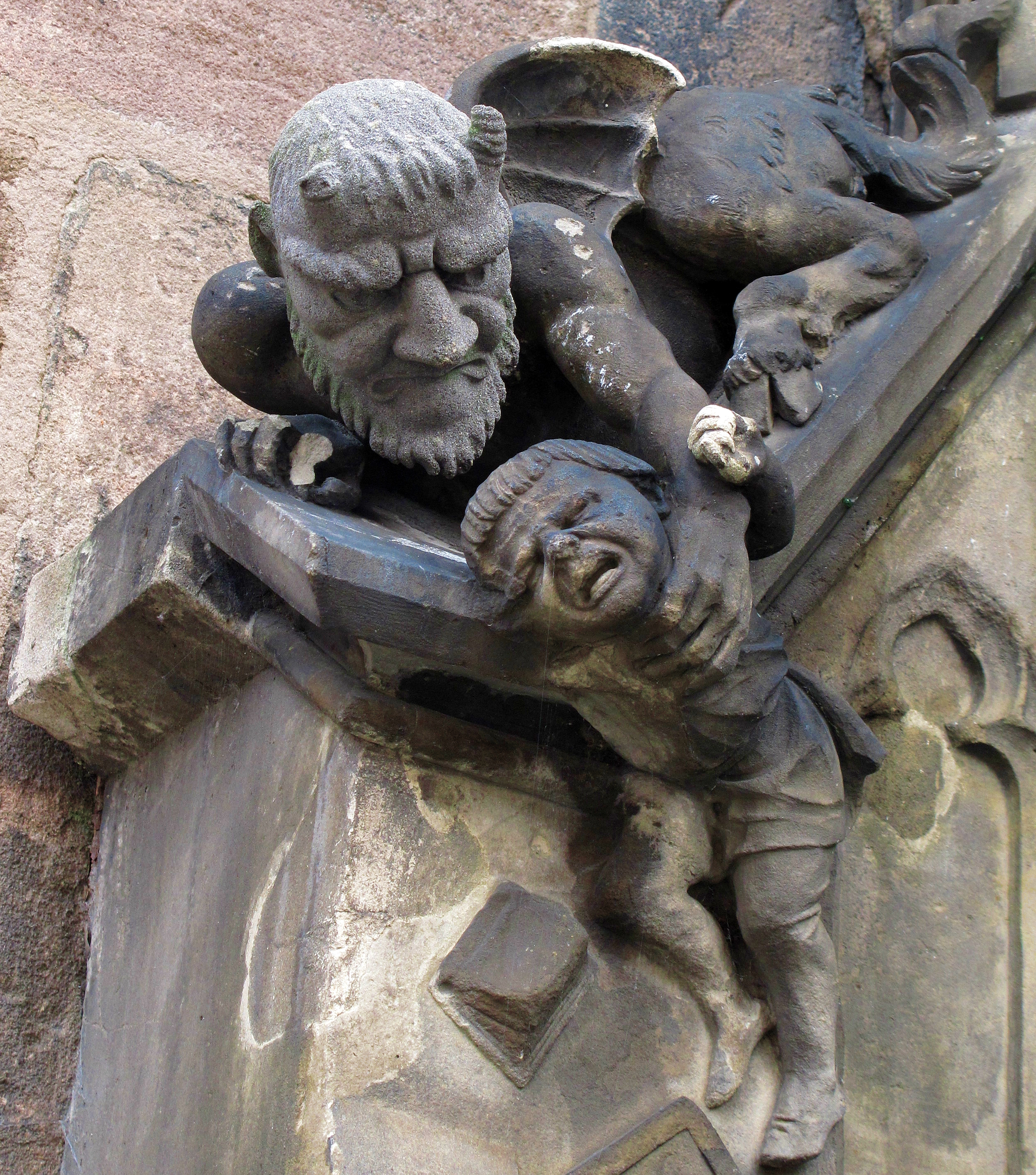 Teufelsbrünnlein Detailansicht